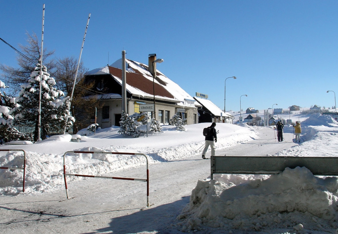 Zinnwald (Erzgebirge), Alter Grenzübergang Zinnwald - Cinovec - Ausreise (jetzt Wanderübergang und Linienbusverkehr)